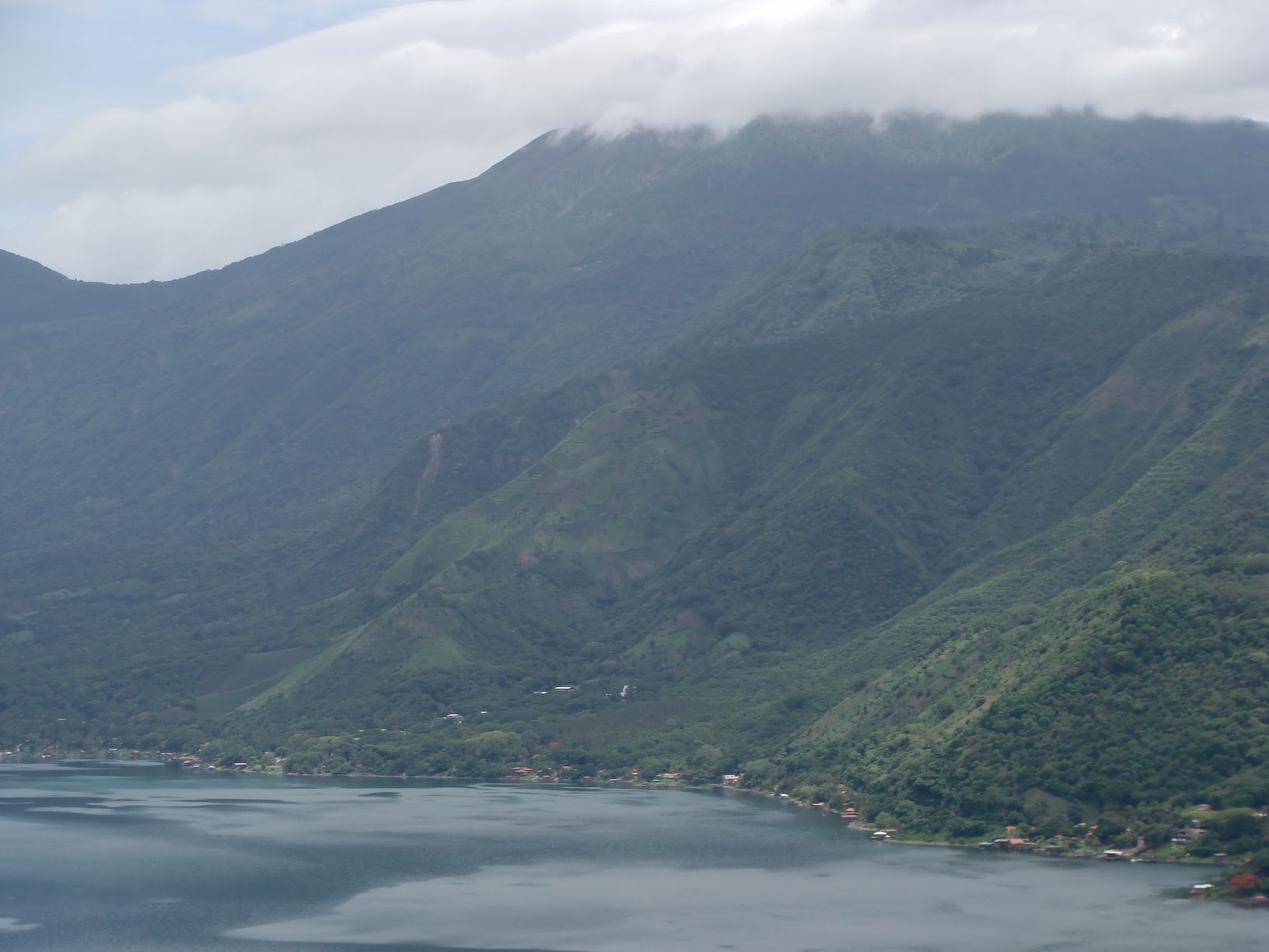 Fotografía del volcán Ilamatepec en El Salvador. Abajo, la orilla del Lago Coatepeque